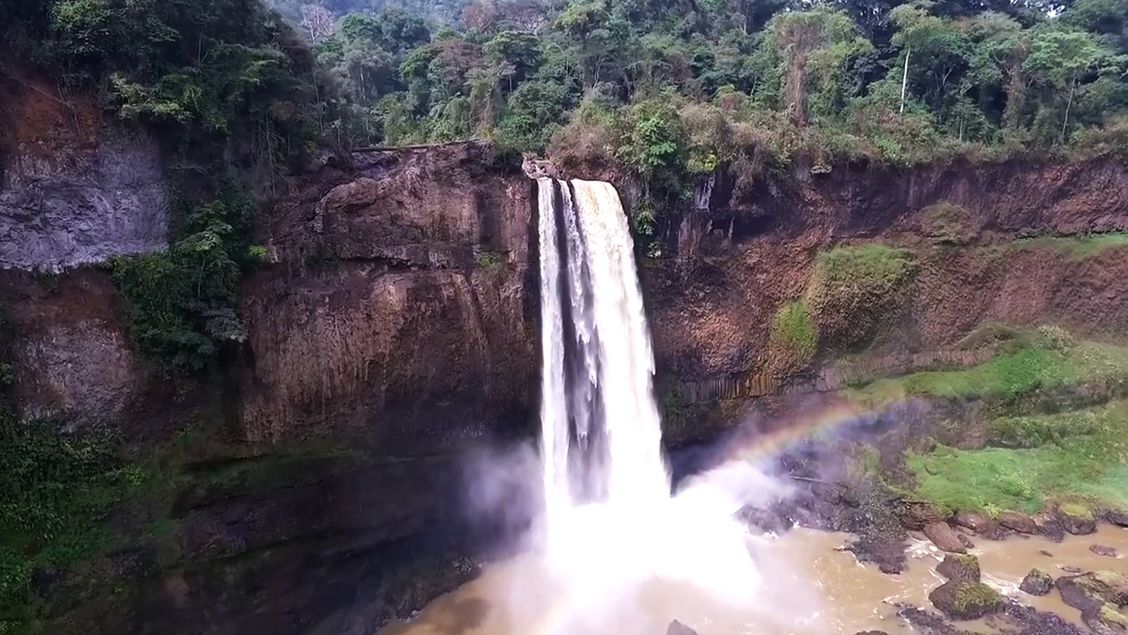 Les chutes d'Ekom sont situées dans le département du Moungo au Cameroun, à proximité de Melong, sur le fleuve Nkam